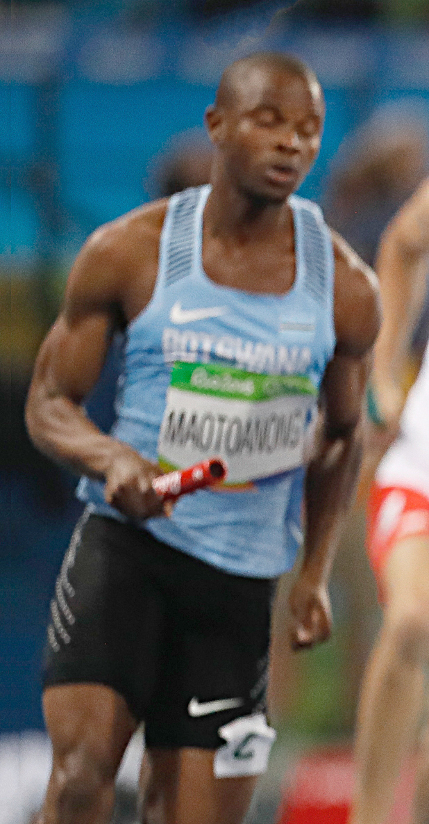 Rio de Janeiro - Eliminatórias do revezamento 4 x 400m nos Jogos Rio 2016, no Estádio Olímpico (Fernando Frazão/Agência Brasil)